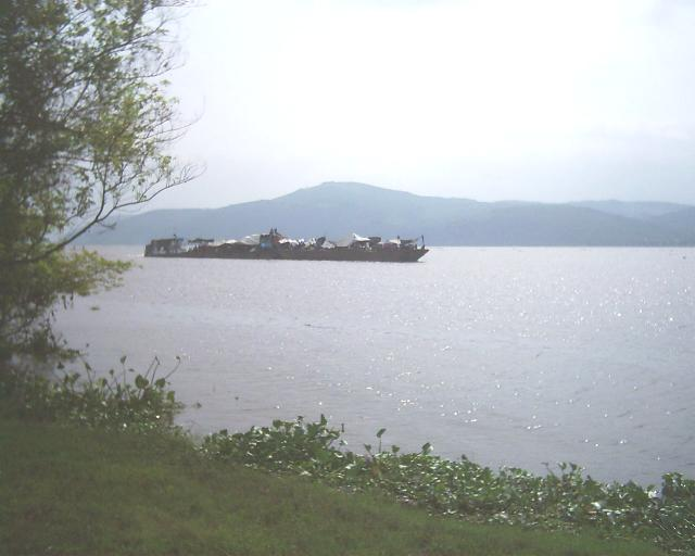 Commune de Moluku, Kinshasa, République démocratique du Congo.